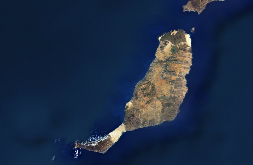 Insula Fuerteventura din arhipelagul Canarelor, vedere satelit